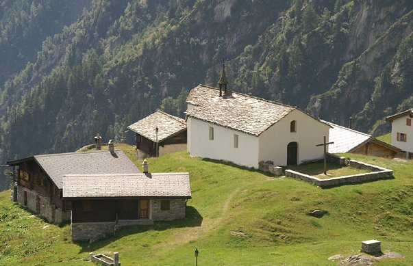 Kapelle auf der Alpe Bel